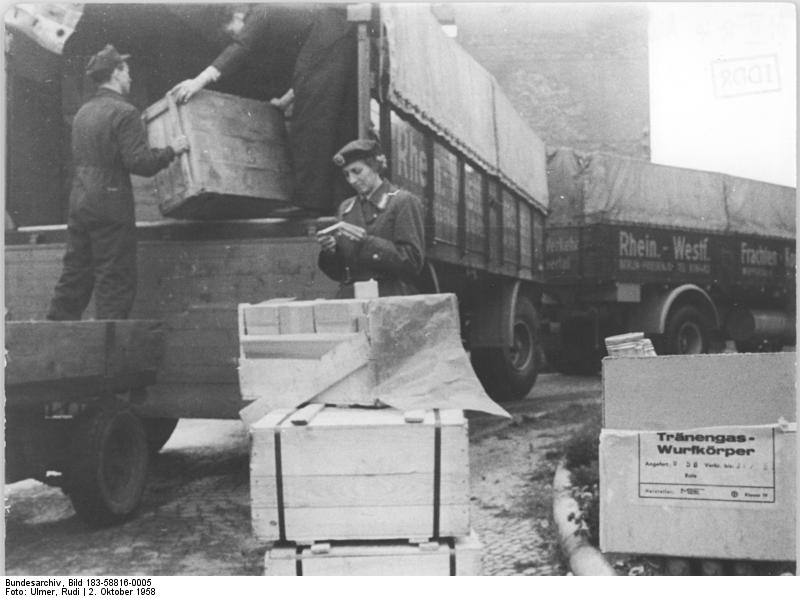 Zentralbild Ulmer 2.10.1958 Repro Tränengasbomben für Westberliner Wahlen (Siehe ADN-Meldung Nr. 240 vom 2.10.1958 UBz: Tränengasbomben, die mit diesem Lastzug aus der Westzone durch die DDR nach West-Berlin transportiert werden sollten.